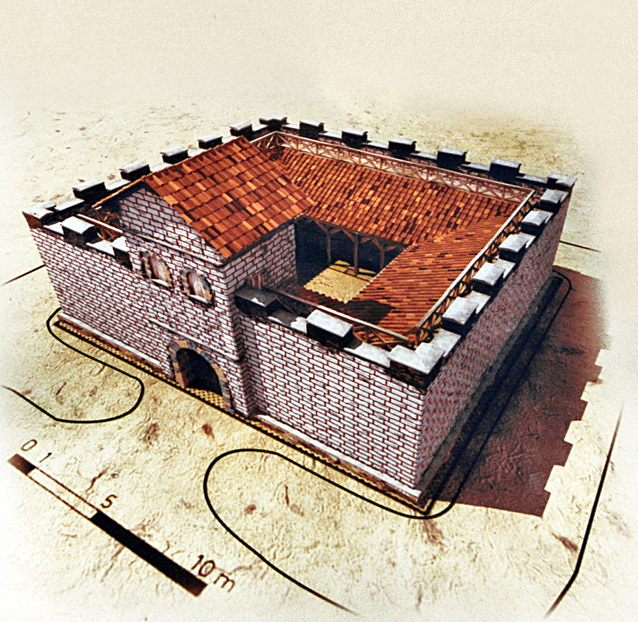 Kleinkastell am Hinteren Schloßbuck – Reonstruktionszeichnung